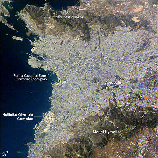 Athen